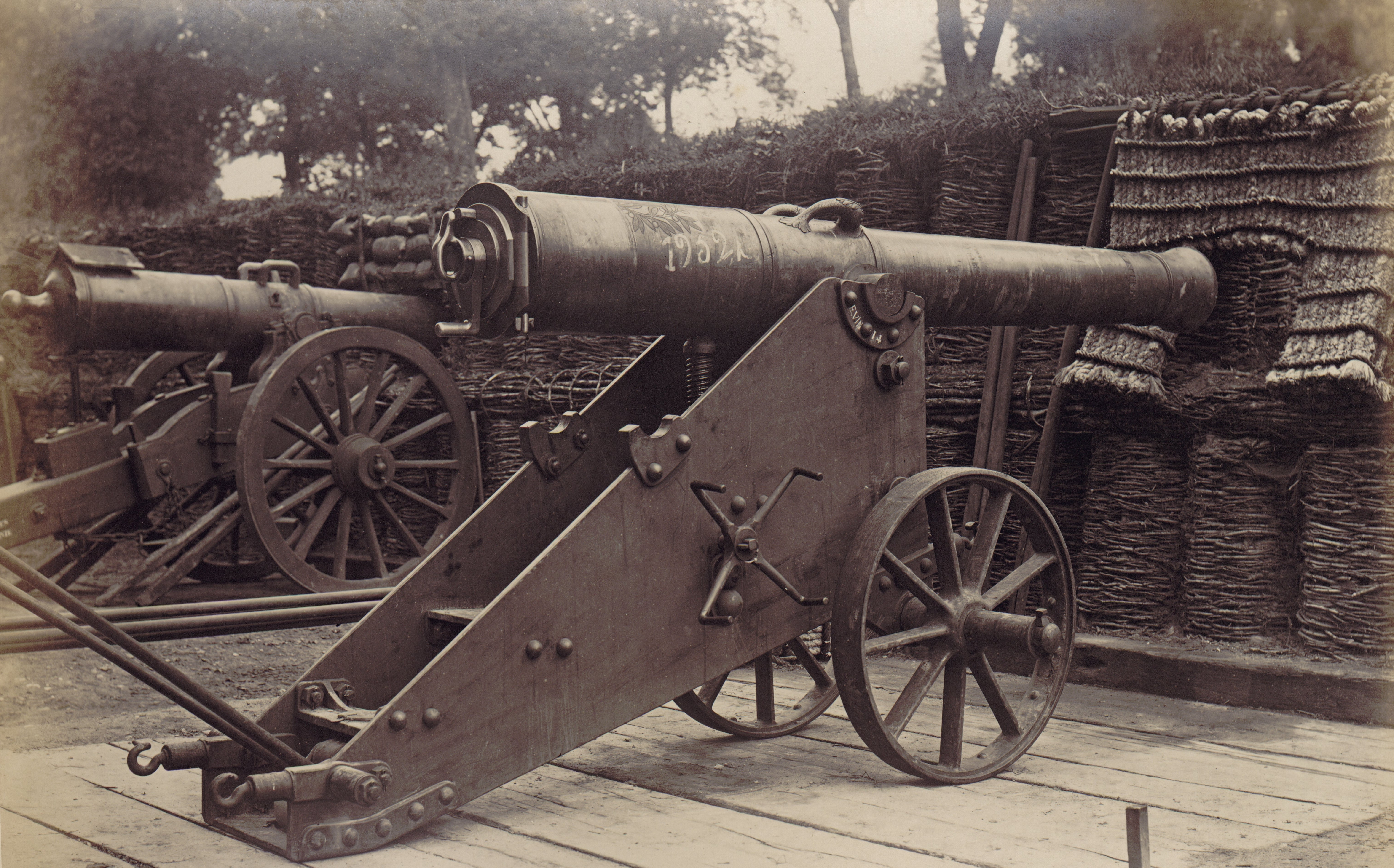 Matériel de l'artillerie et des équipages militaires : canon de 138 de place en batterie, sur affût à soulèvement en tôle.